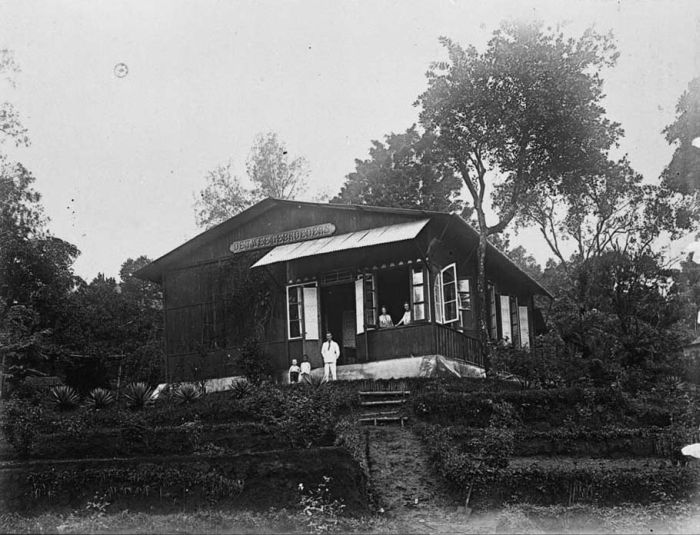 Foto. De naam van het huis is De Twee Gebroeders. Het huis van de familie Jeswiet, gelegen in Soekapoera, Oost-Java op 900 meter hoogte